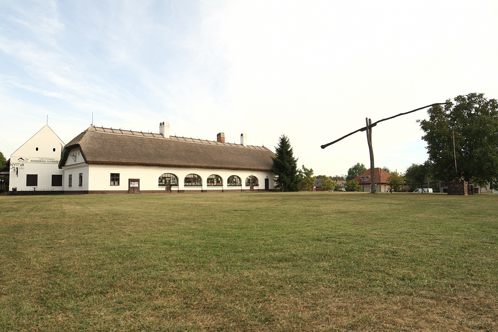 Kondorosi csárda (Kondoros, Hősök utca 23.) This is a photo of a monument in Hungary. Identifier: 2495